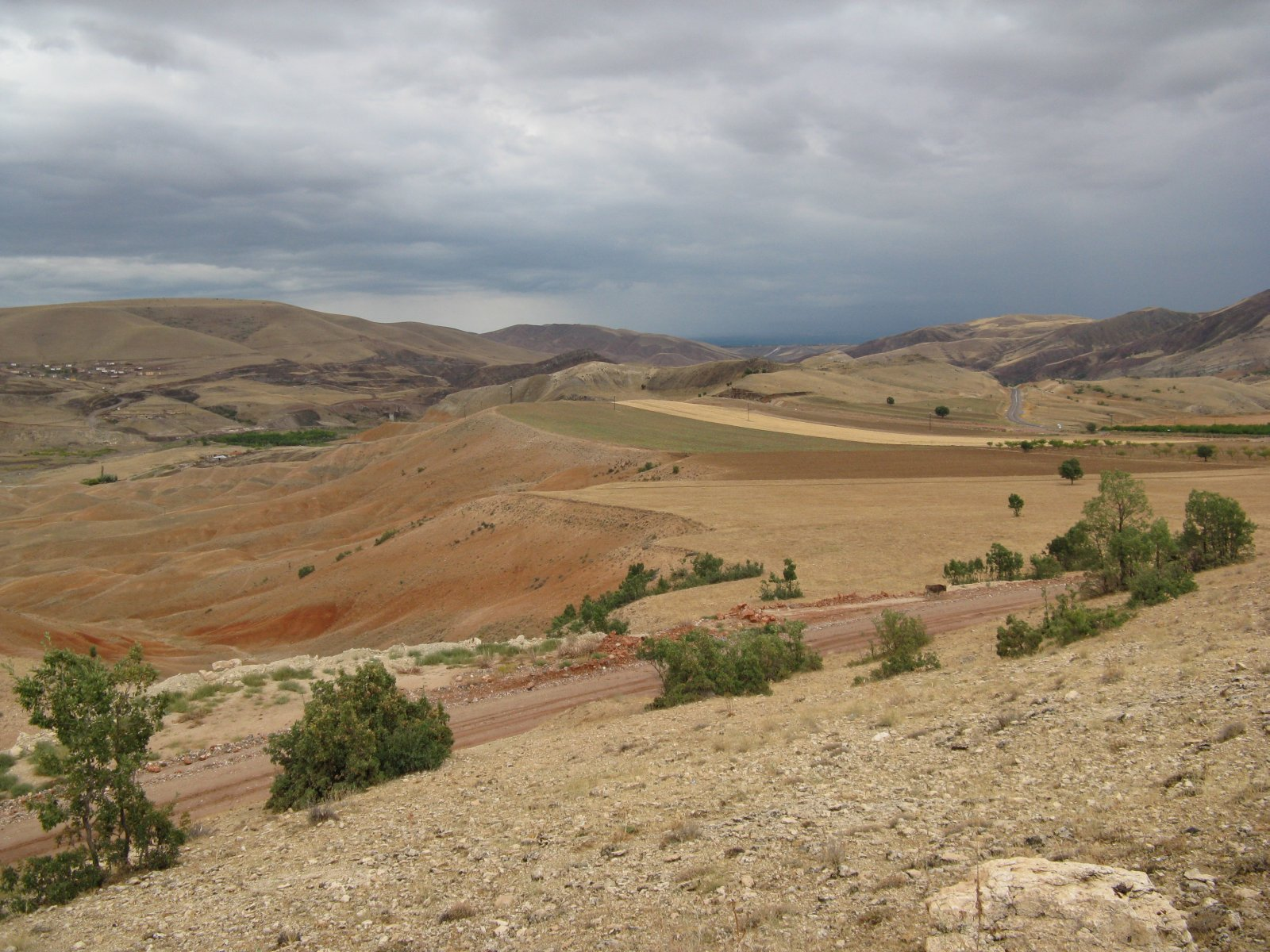 Anatolian Plateau near Malatya